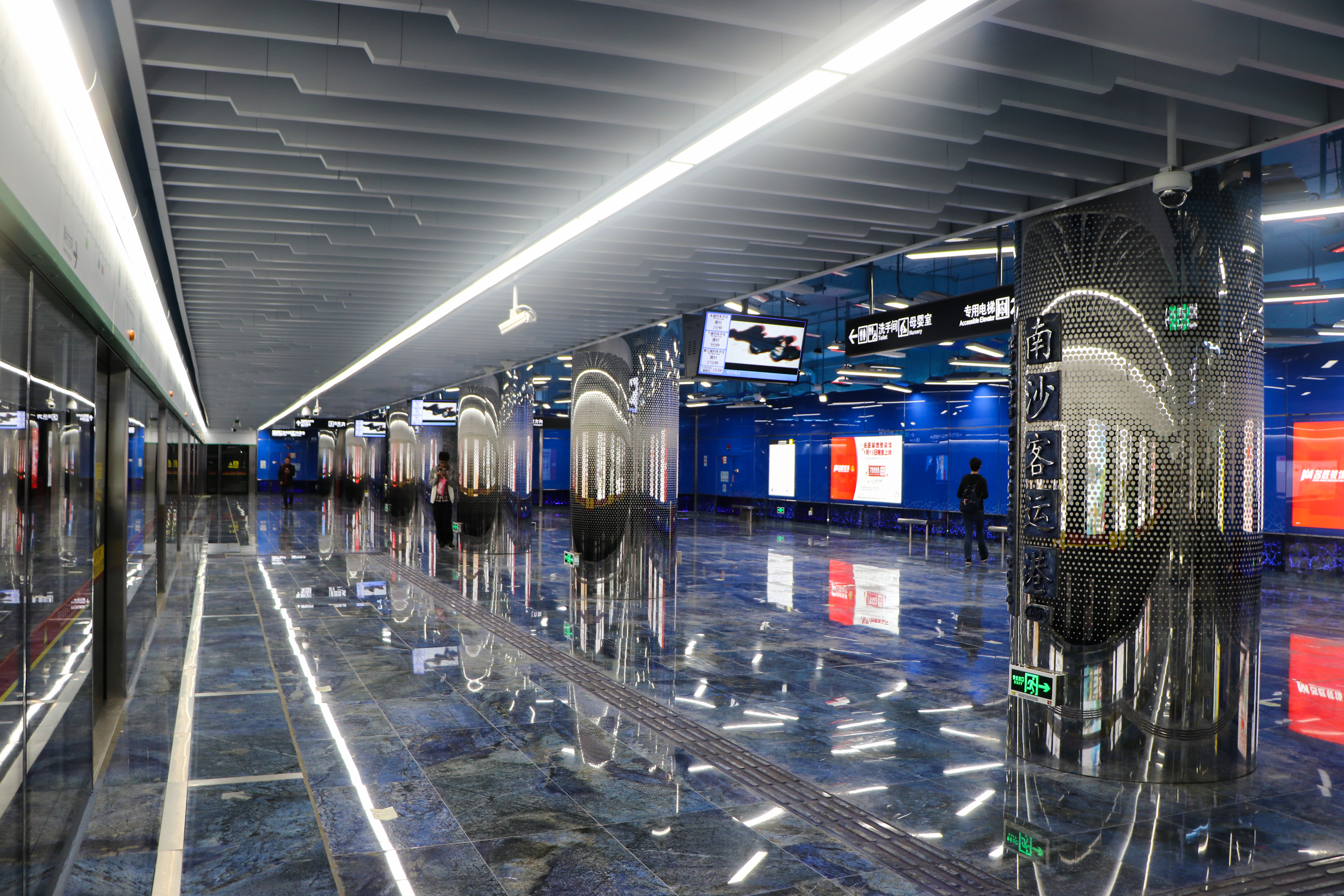 广州地铁南沙客运港站